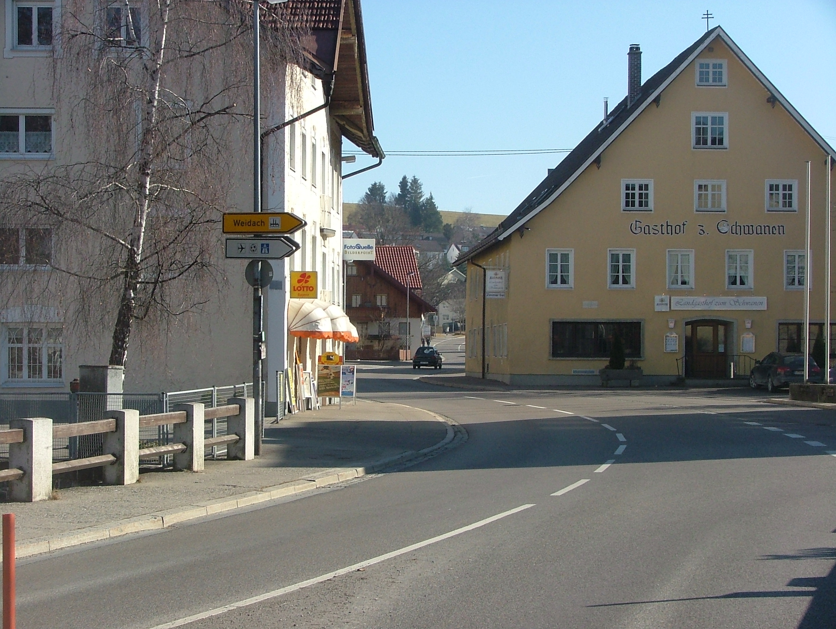 Durach }